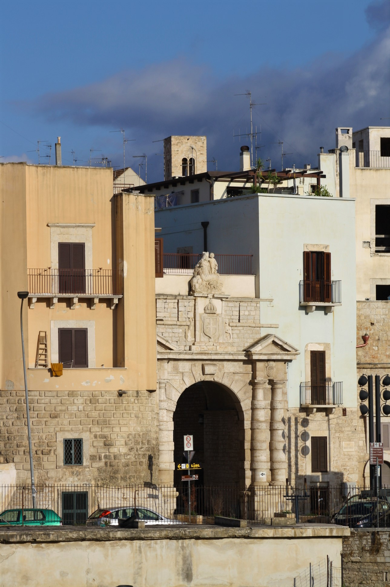 Porta la Maya o del Carmine insieme a Porta Baresana, sono le uniche due porte rimaste delle cinque porte che costituivano l'accesso al borgo antico. This is a photo of a monument which is part of cultural heritage of Italy.